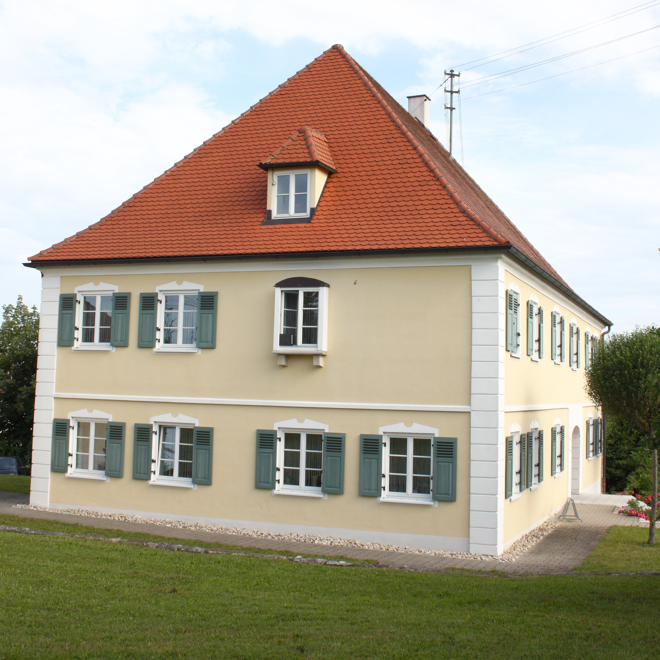 ehemaliges Pflegamt in Weisingen, einem Ortsteil von Holzheim im Landkreis Dillingen an der Donau, Hochstiftstraße 2